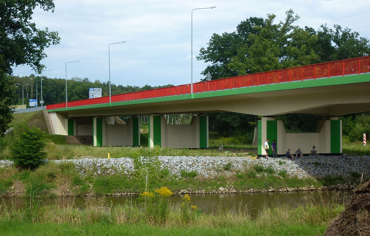 Neißebrücke zwischen Sagar und Łęknica